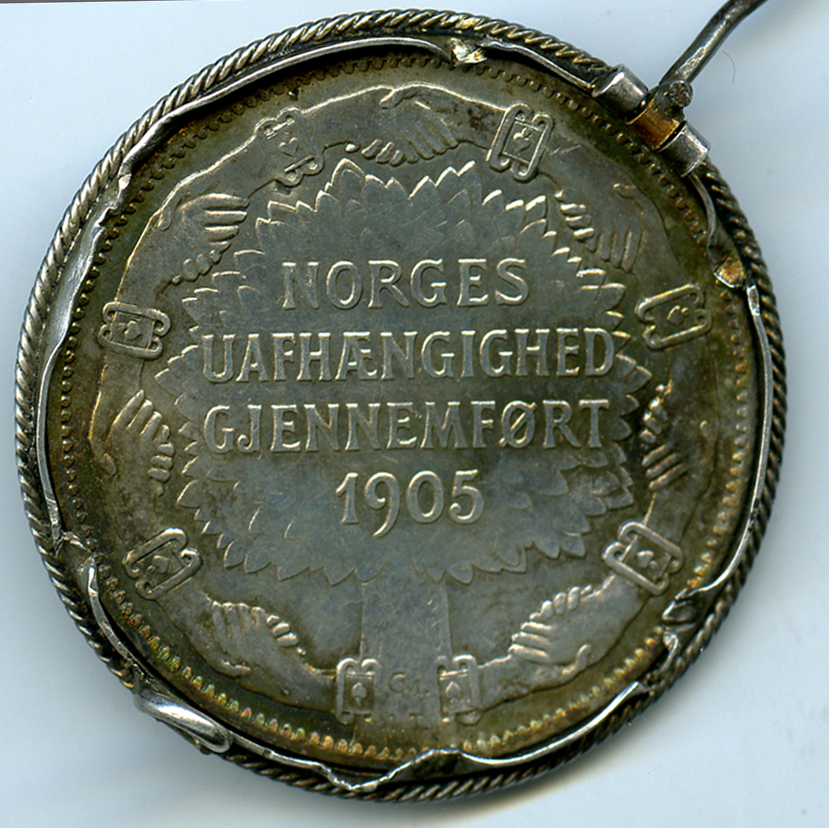 Format: Fotopositiv Dato / Date: Ukjent Fotograf / Photographer: Ukjent Sted / Place: Trondheim Wikipedia: Unionsoppløsningen Wikipedia: Norske mynter Eier / Owner Institution: Trondheim byarkiv, The Municipal Archives of Trondheim Arkivreferanse / Archive reference: Nypvang skole: U – Diverse foto (F22107) Antagelig etterlatenskap etter tidligere lærerinne ved Nypvang skole, Helga Alkine Larssen (1871 - 1955).